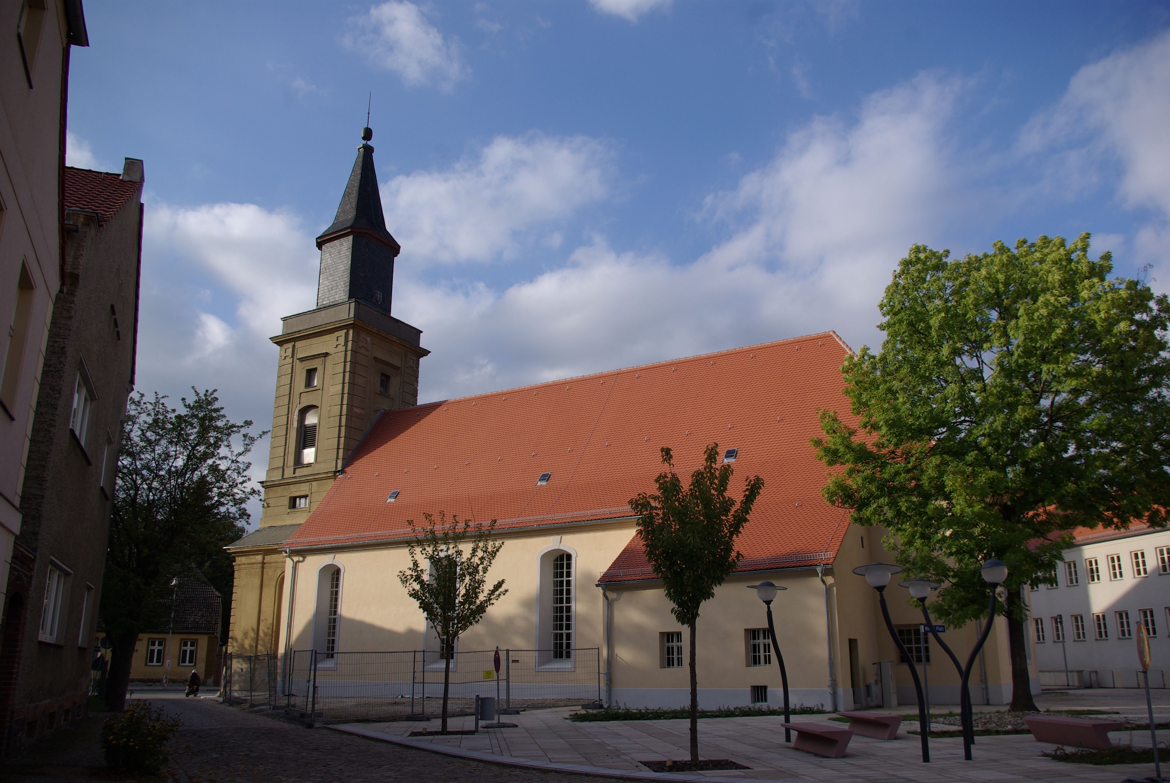 Trebbin in Brandenburg. Die St. Marien Stadtkirche wurde 1740 bis 1744 erbaut. Die Kirche steht unter Denkmalschutz.